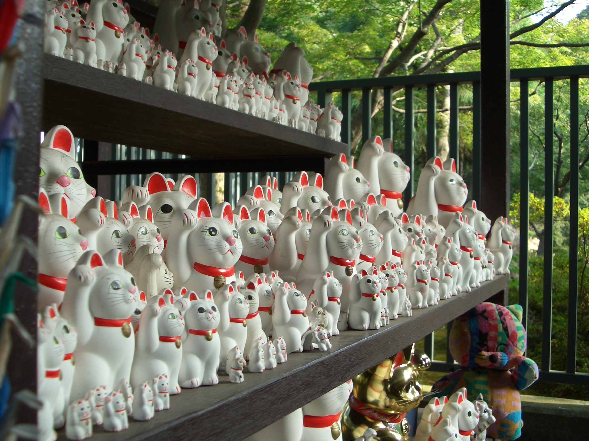 Dedicated Maneki-nekos (招き猫) in Gotoku-ji (豪徳寺)